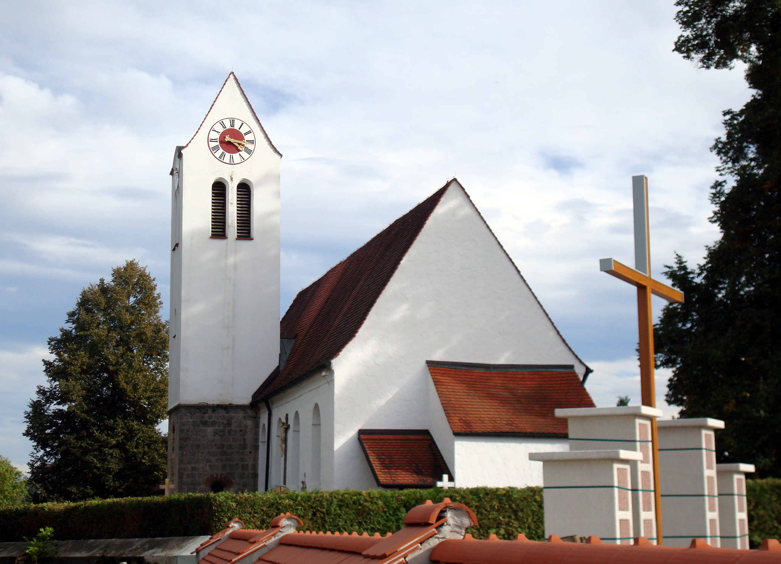 Gauting, Ortsteil Unterbrunn, Kirchstraße 17. Kath. Pfarrkirche St. Laurentius. Spätgotisches Bauwerk vom Ende des 15. Jahrhunderts. Der barocke Ausbau und die Verlängerung des Langhauses erfolgte im 18. Jahrhundert. This is a photograph of an architectural monument.